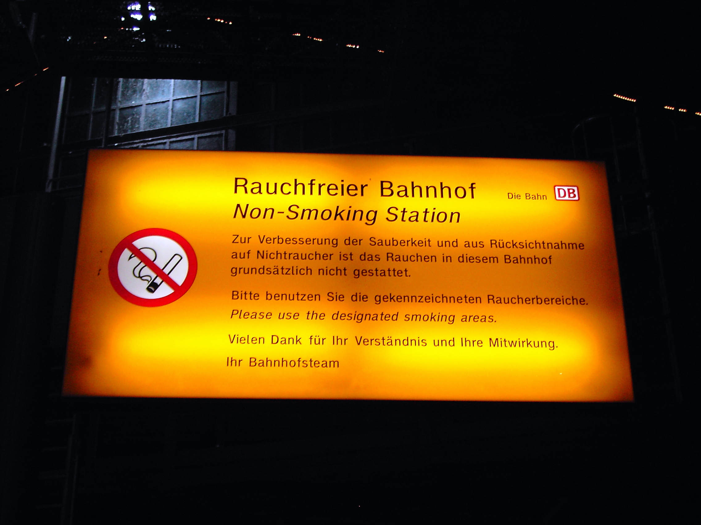 Hinweis Bahnhof Berlin Friedrichstraße